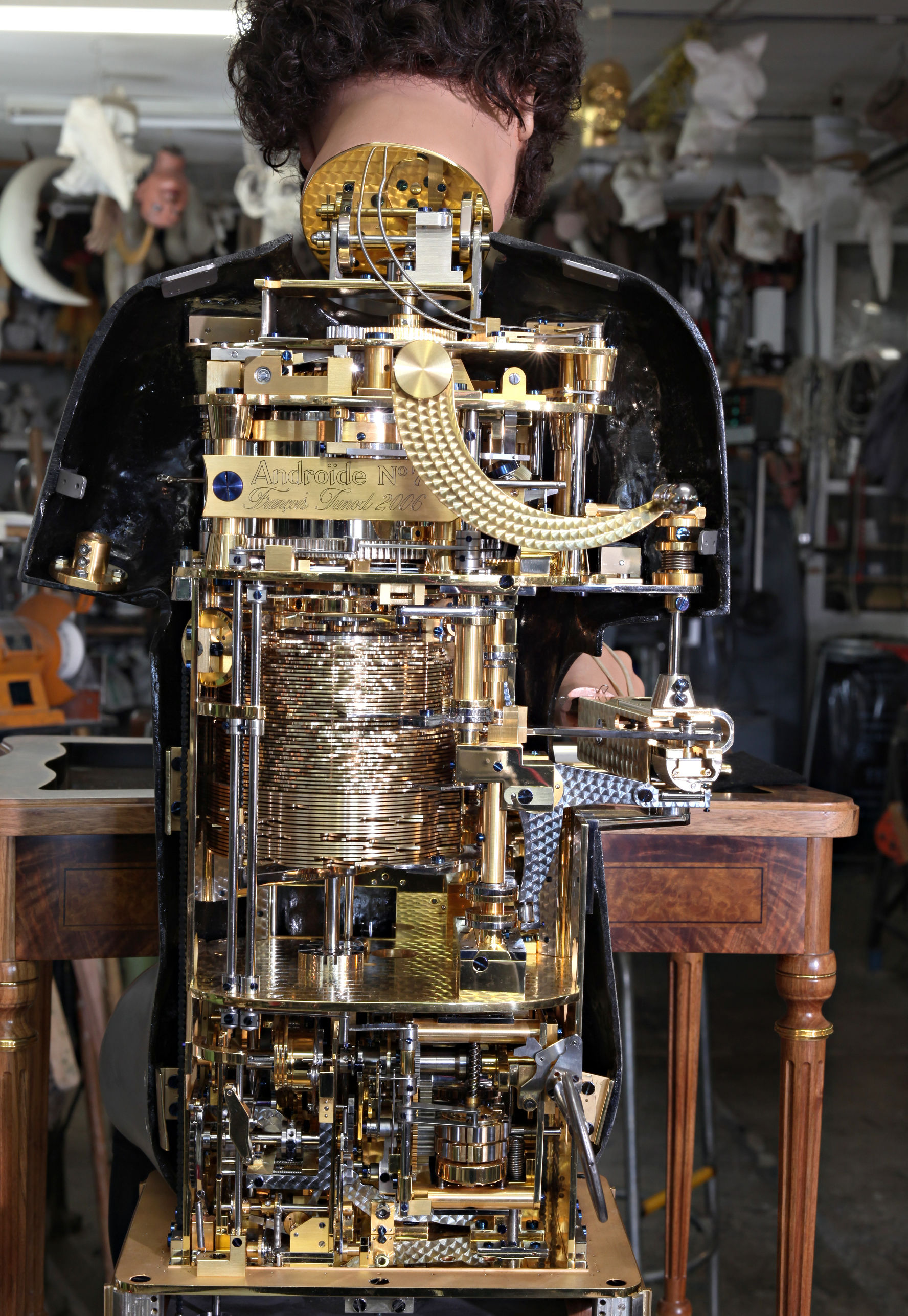 Réalisation François Junod, Sainte-Croix, Suisse.